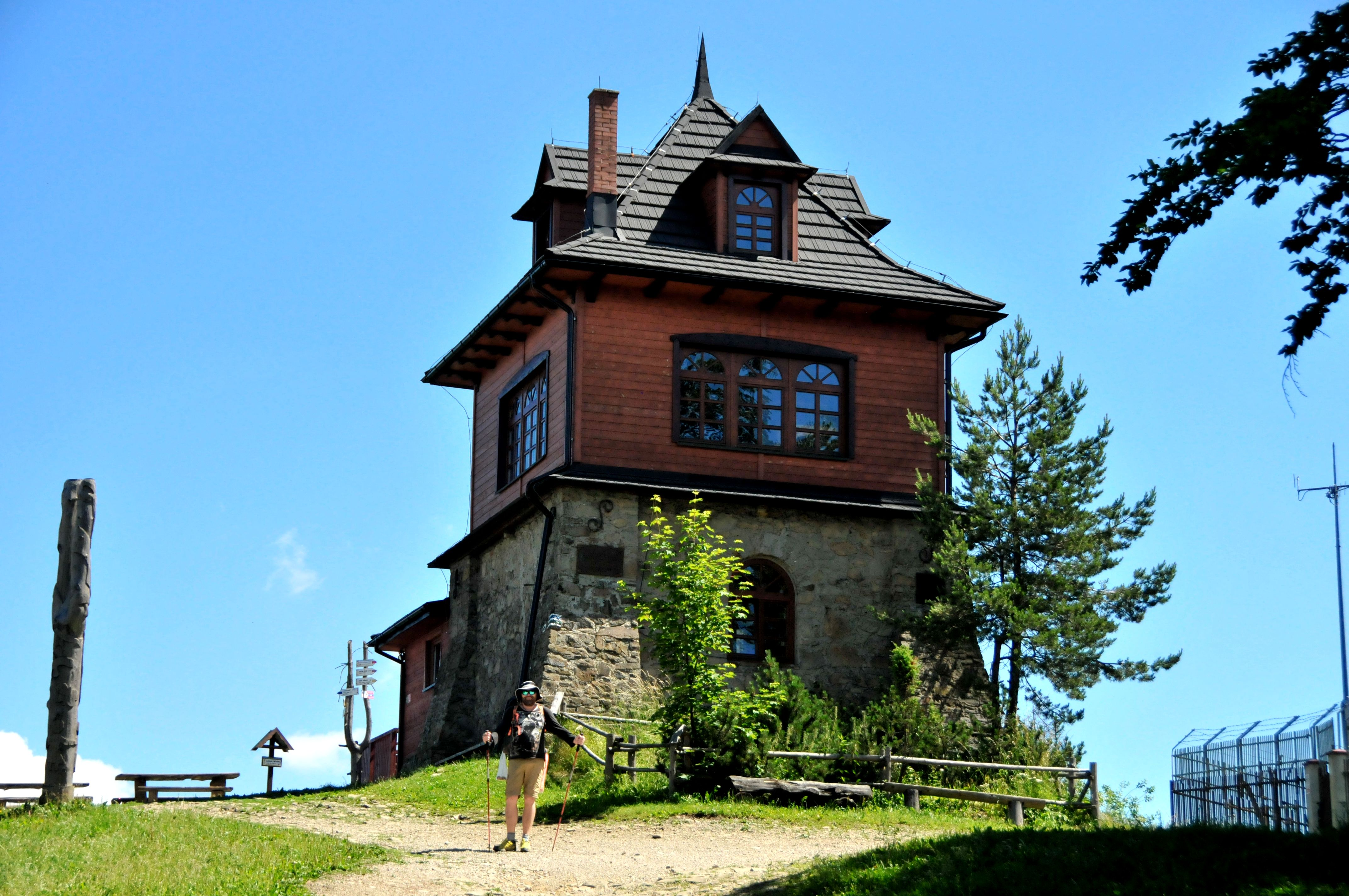 Rezerwat przyrody: Luboń Wielki This is a photography of protected area with CRFOP ID PL.ZIPOP.1393.RP.987